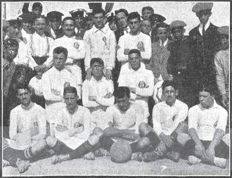 Plantilla del club de fútbol Algeciras Sporting Club en un partido jugado contra el Victoria Ena Club de La Línea de la Concepción en junio de 1913 según El Mundo Gráfico del 18 de Junio de 1913.